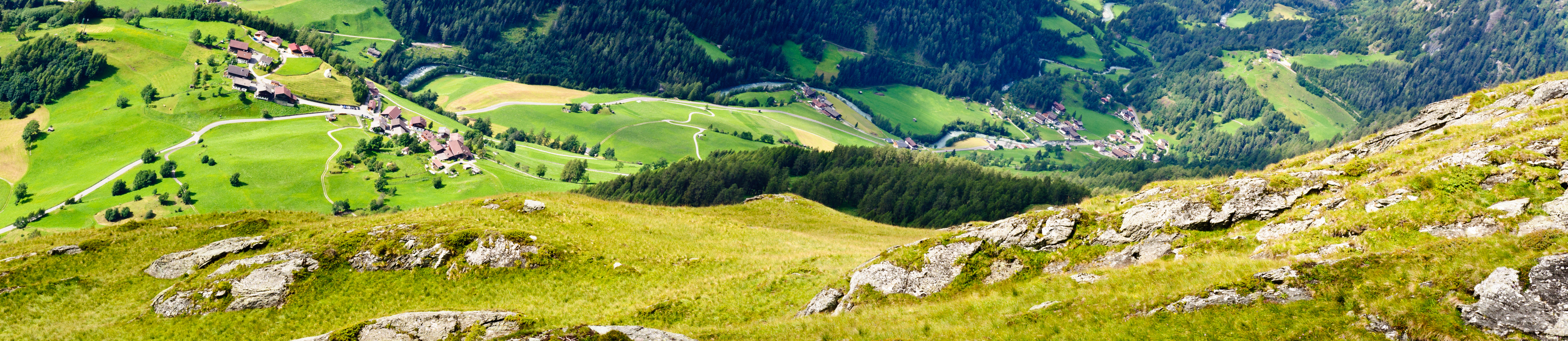 Ausblick vom "Fenster" auf die Fraktionen Bichl und Hinterbichl